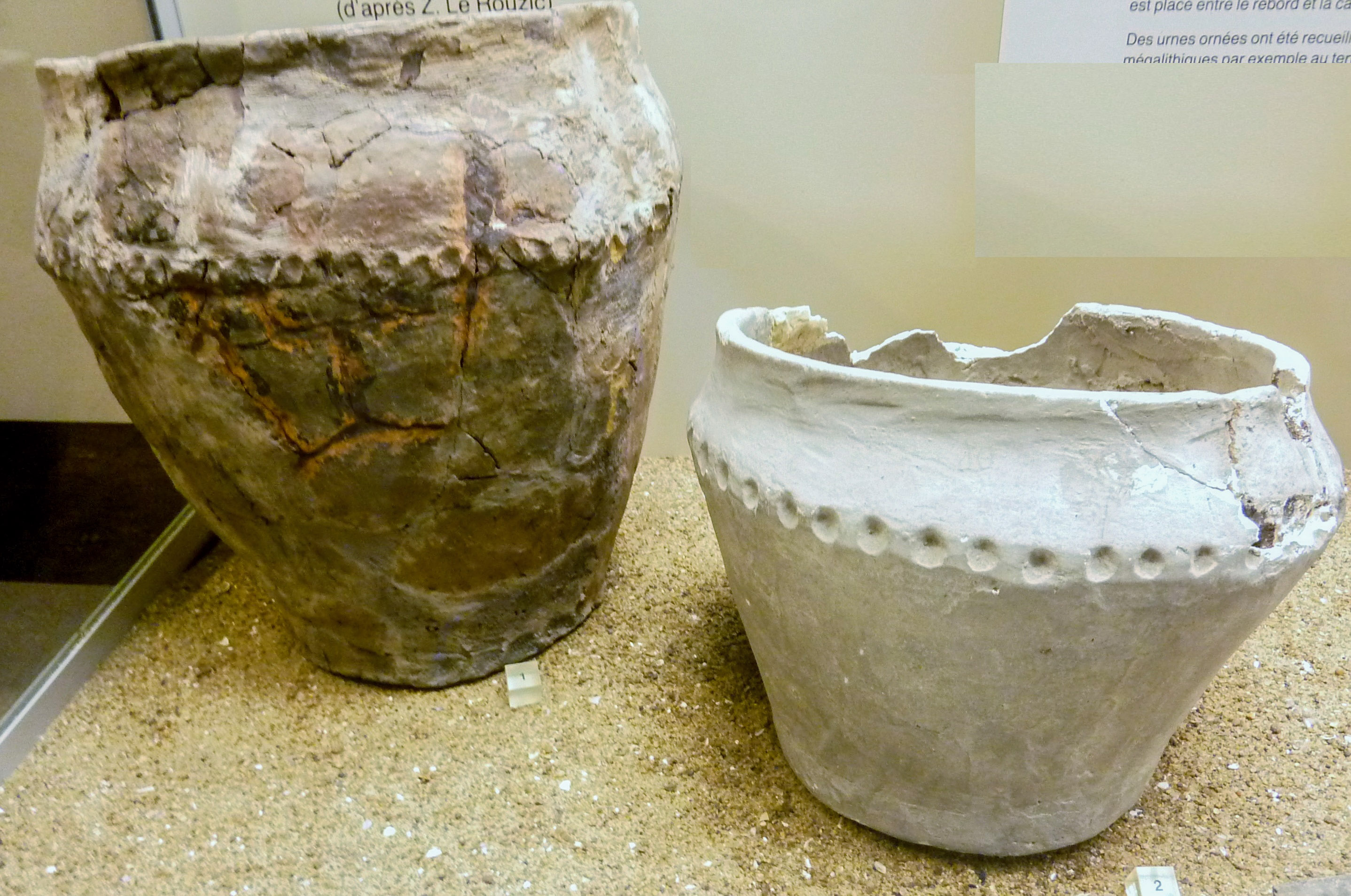 Deux vases trouvés à Carnac : à gauche, vase en bronze trouvé dans le tertre tumulaire de Kerlescan ; à droite vase en terre grise avec cordon d'impressions trouvé à Kertraval (Musée de préhistoire de Carnac)